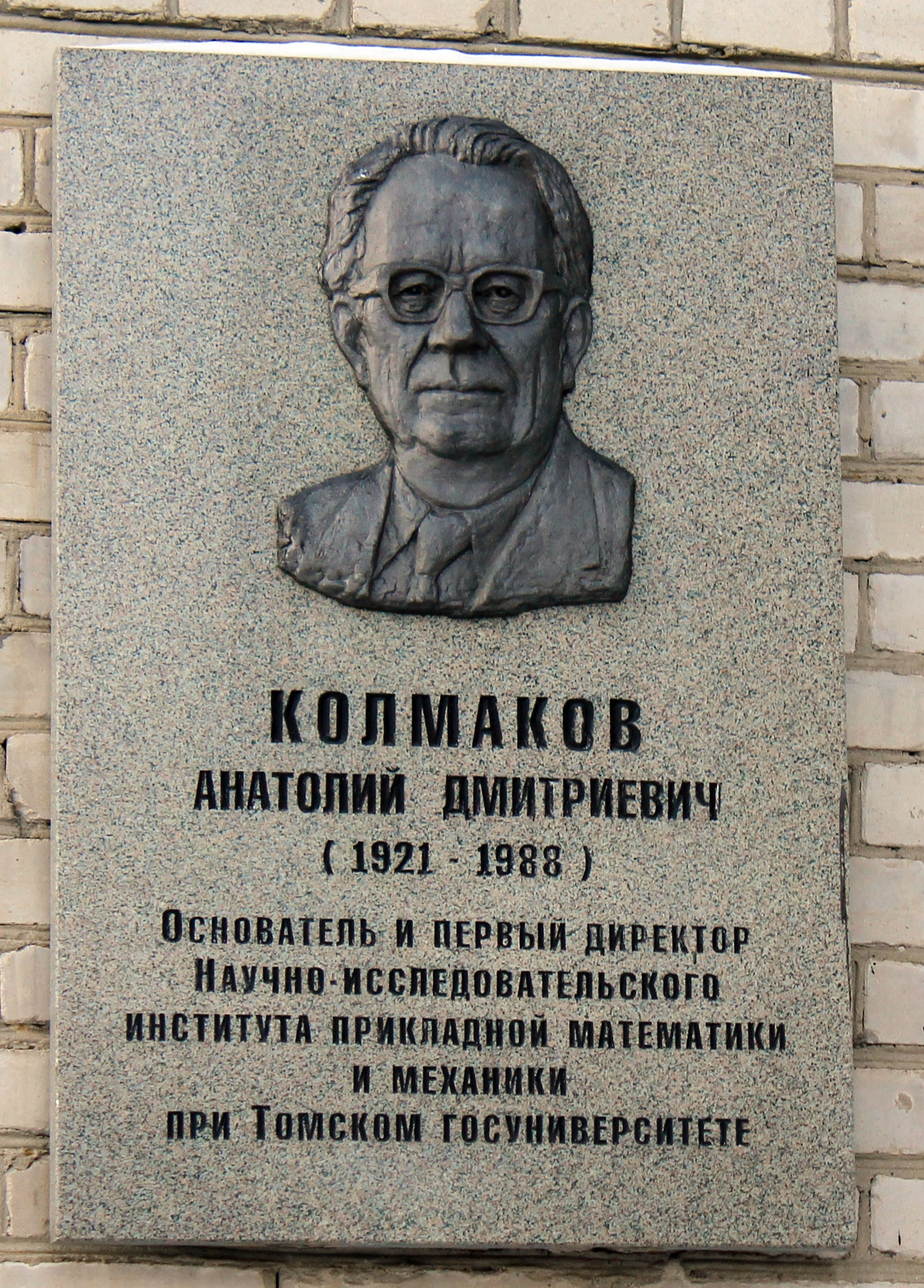 Мемориальная доска Анатолию Дмитриевичу Колмакову в университетской роще ТГУ